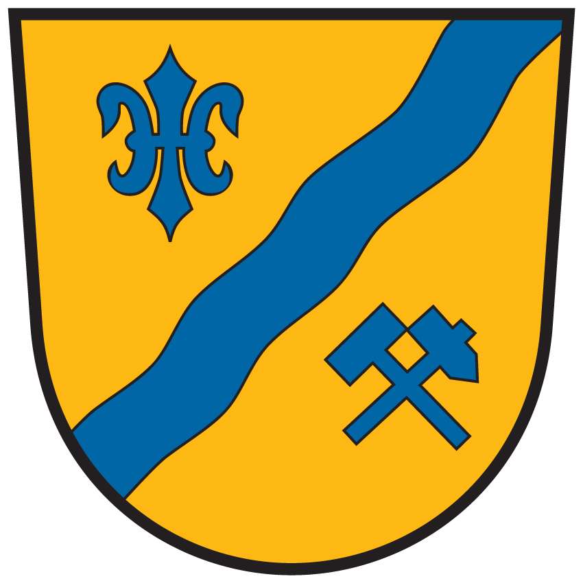 Wappen von Dellach